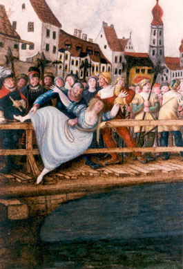 Agnes Bernauer (um 1410 - 1435 STRAUBING), Geliebte, vermutlich Ehefrau Herzog Albrechts III. von Bayern-München